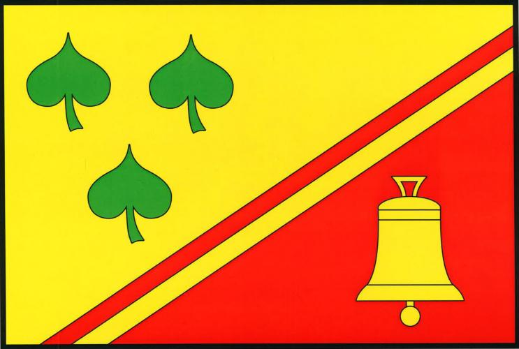 Prusice vlajka